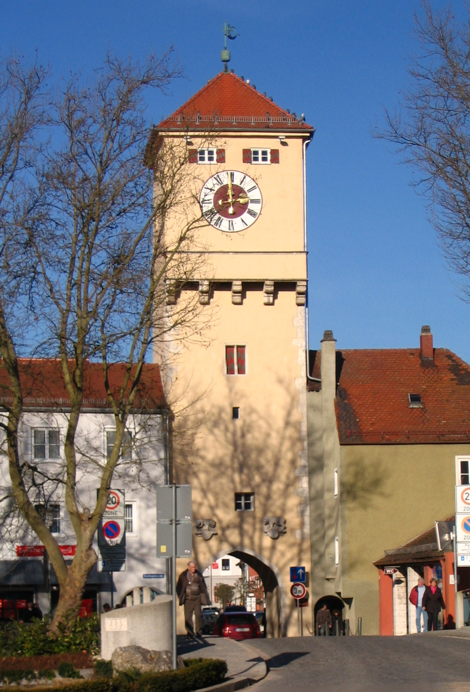 Stadt Kelheim, Niederbayern:Das Donautor, eines der drei Stadttore